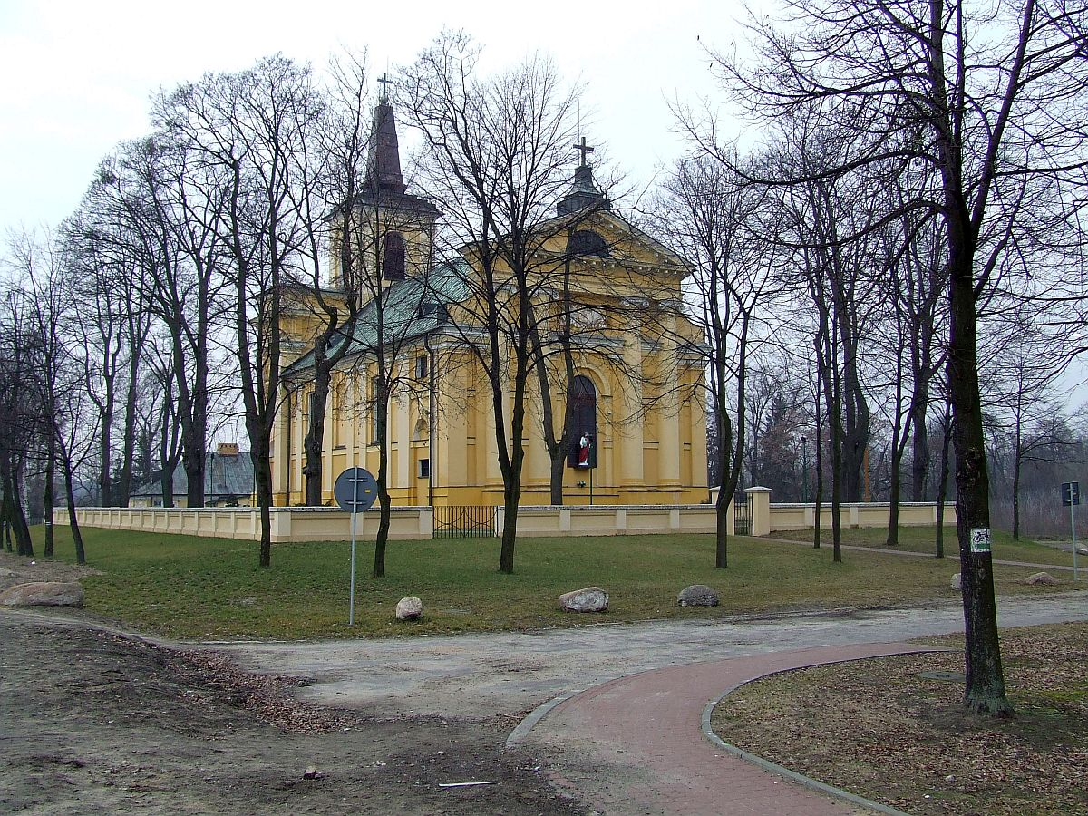 Zaborów (powiat warszawski zachodni), church